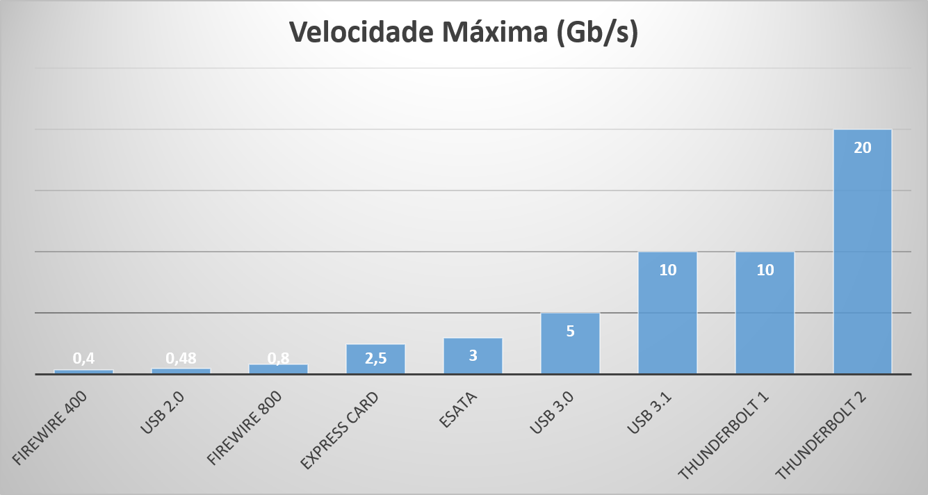 Comparação de velocidade entre diversas tecnologias.